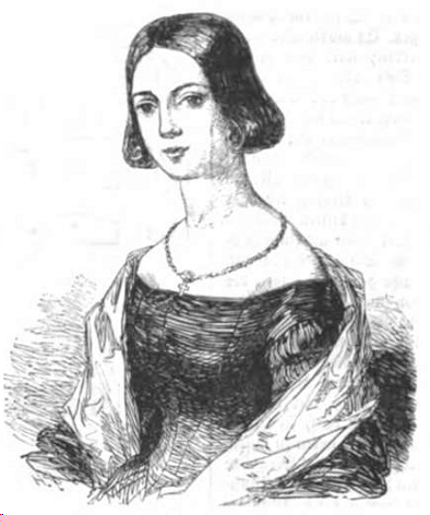 Madame Pauline Viardot-Garcia.